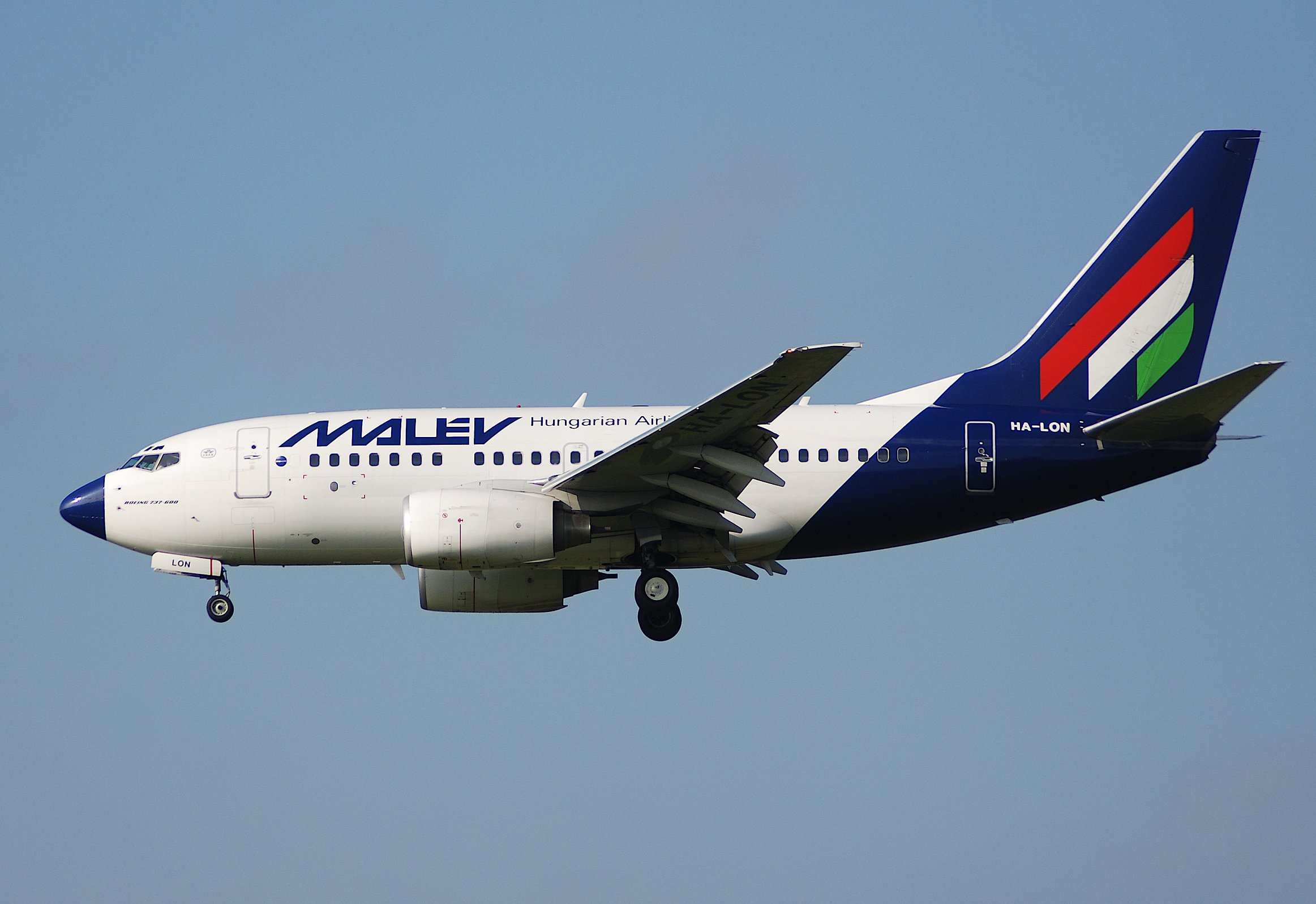 MALEV Boeing 737-600; HA-LON@ZRH;08.09.2007/487bx